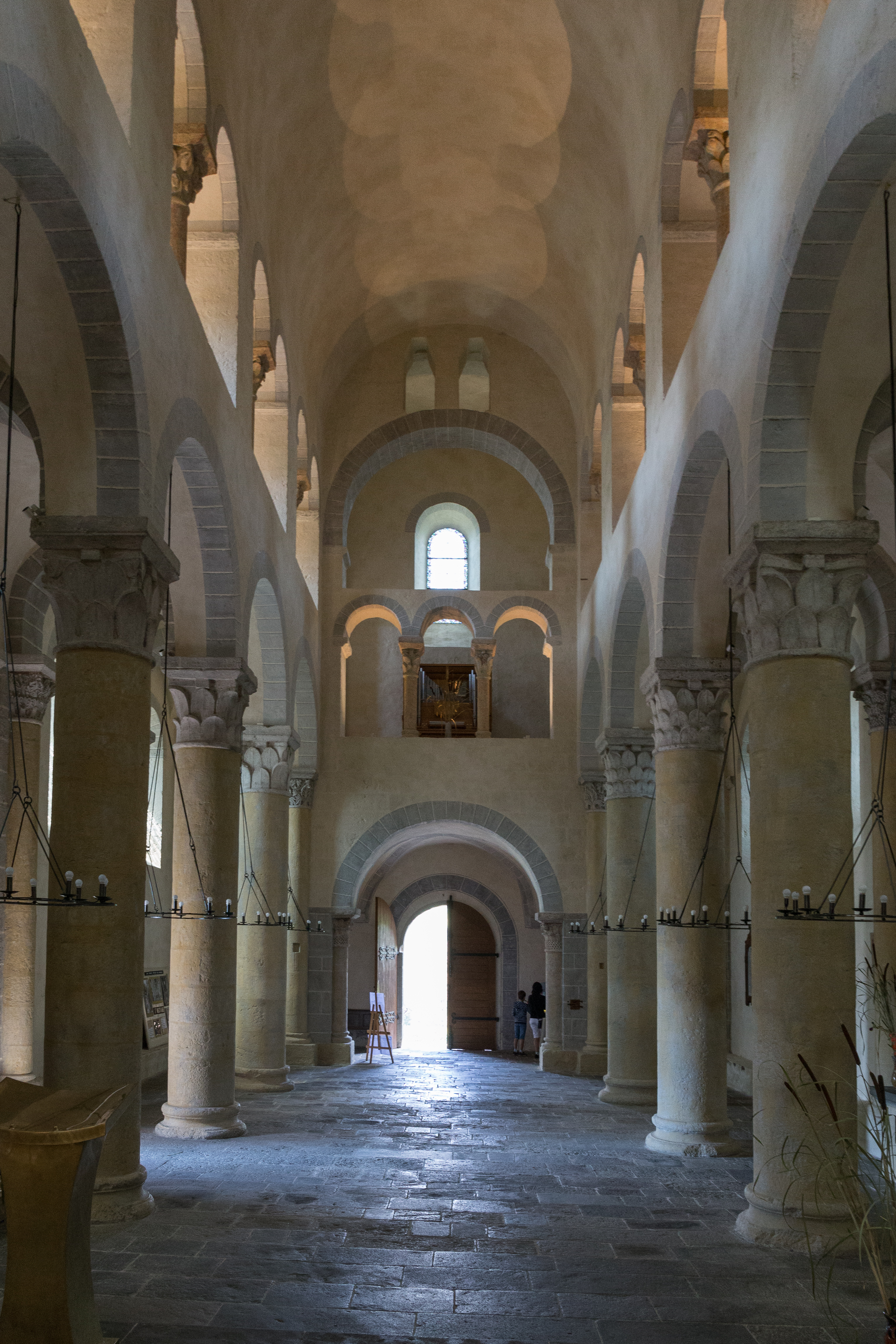 Nef de l'église de Saint-Nectaire. .